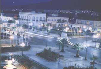 sig, algerie